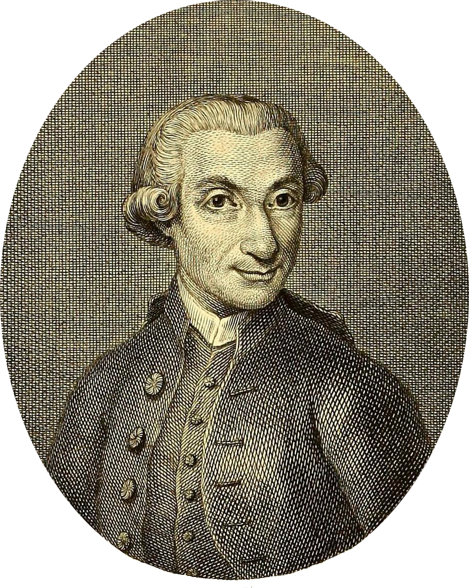 D.JUAN IGNACIO MOLINA en "Compendio de la historia civil del reyno de Chile" por Molina, Giovanni Ignazio, 1740-1829; Molina, Giovanni Ignazio, 1740-1829. Saggio sulla storia naturale del Chile. Español